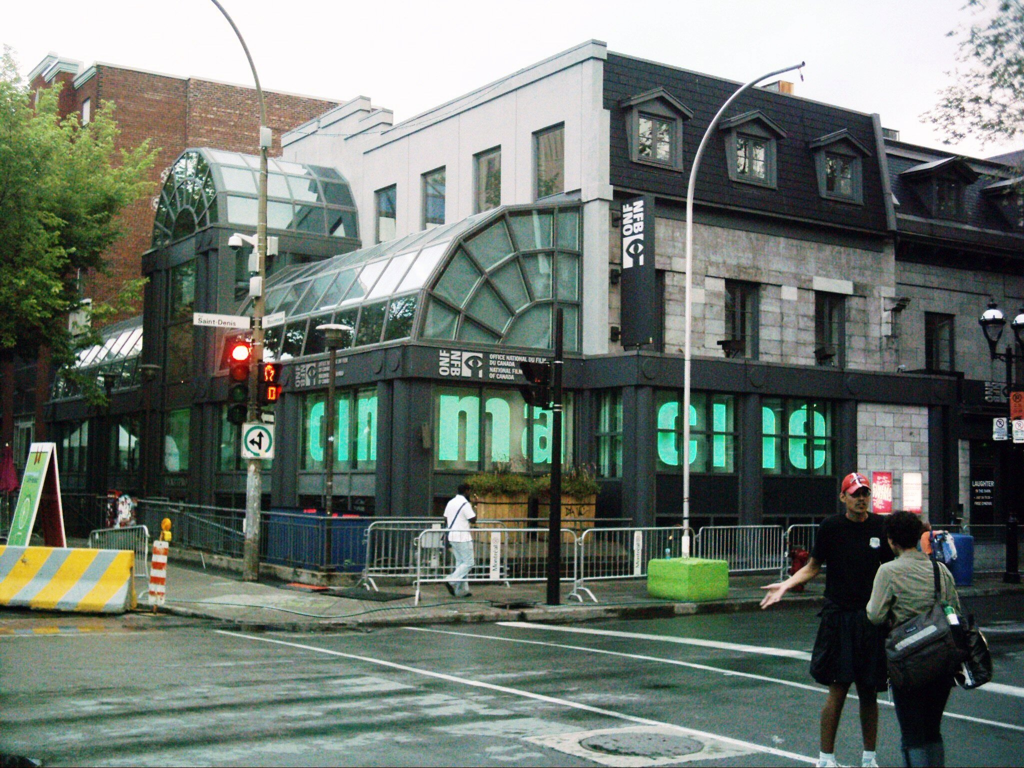 L'ancienne CinéRobothèque de l'Office National du Film, située au 1564, rue Saint-Denis, à l'intersection du boulevard de Maisonneuve à Montréal. Le jeu de lumière pour l'affichage s'inscrit dans le plan d'urbanisme du Quartier des spectacles. En septembre 2013, il est devenu le « Pavillon Judith-Jasmin Annexe (JE) » de l'Université du Québec à Montréal (UQAM). uqam.ca radio-canada.ca : L'UQAM à la cinérobothèque Il est démoli en 2018. La façade en pierre sur Saint-Denis est conservée.